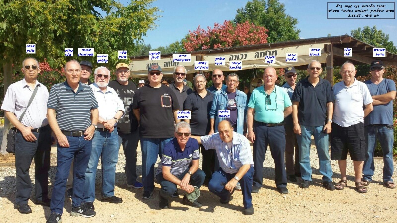 ותיקי מספן המודיעין לאחר הלוויתו של אל"מ דני גזית, בבית העלמין בכפר סבא 3 בנוטבמבר 2017